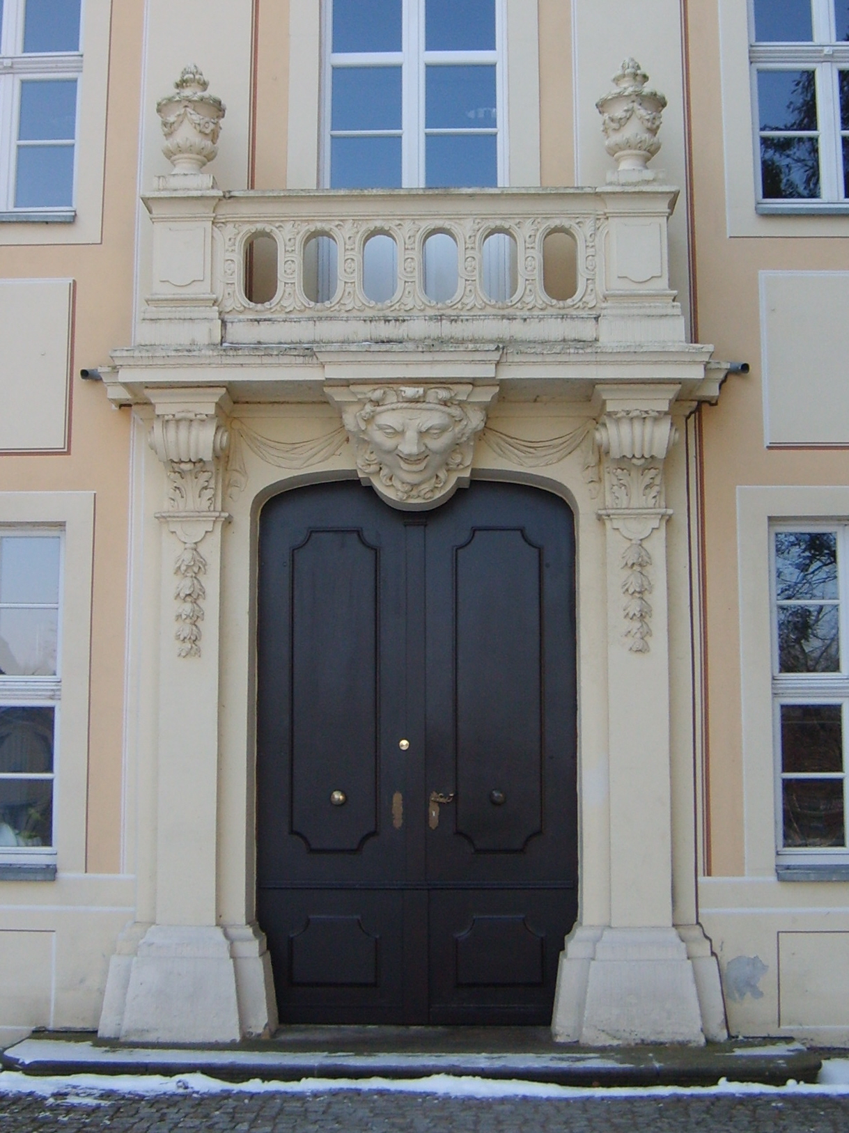 Das Elsterschloss-Gymnasium in Elsterwerda.